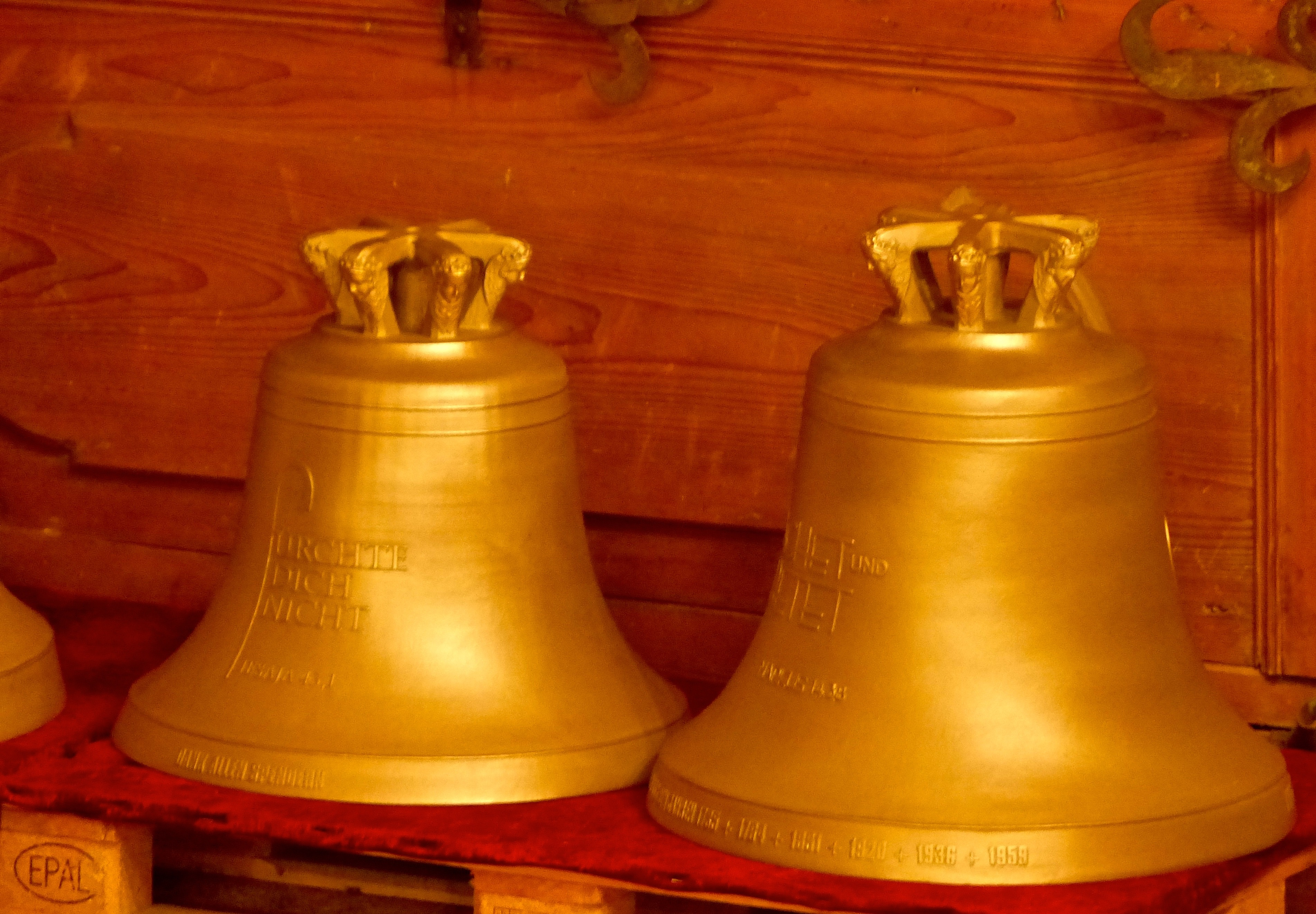 Kirche Oberneuschönberg: Neue Messing-Kirchenglocken, 2012